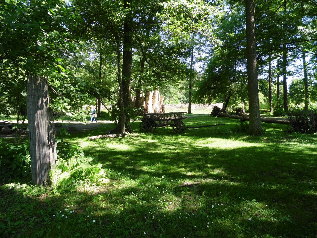 GALINDIA - MAZURSKI EDEN. TEREN OŚRODKA.